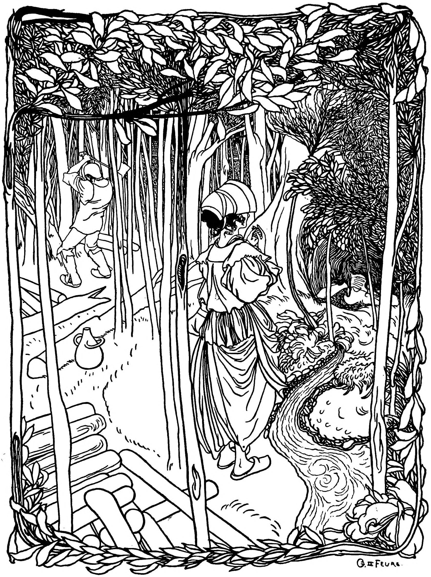 Buchette, issu de La Porte des Rêves